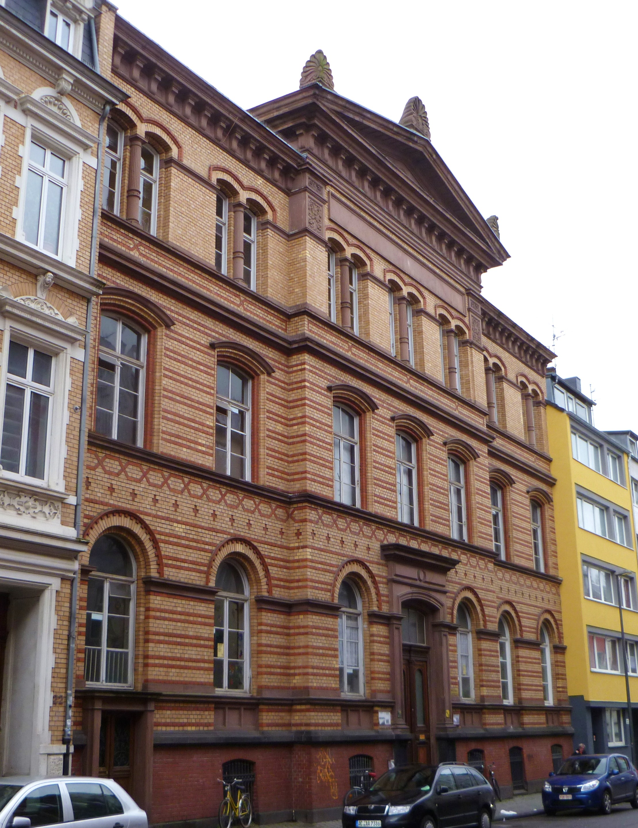 Baudenkmal in Aachen-Mitte; ehemalige Augenheilanstalt Aachen